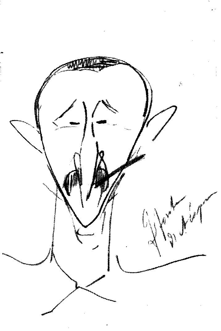 Ferdinando Fontana, caricature by Antonio Cagnoni (1828-1896)